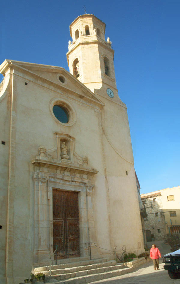 Església de Capafonts, al Baix Camp